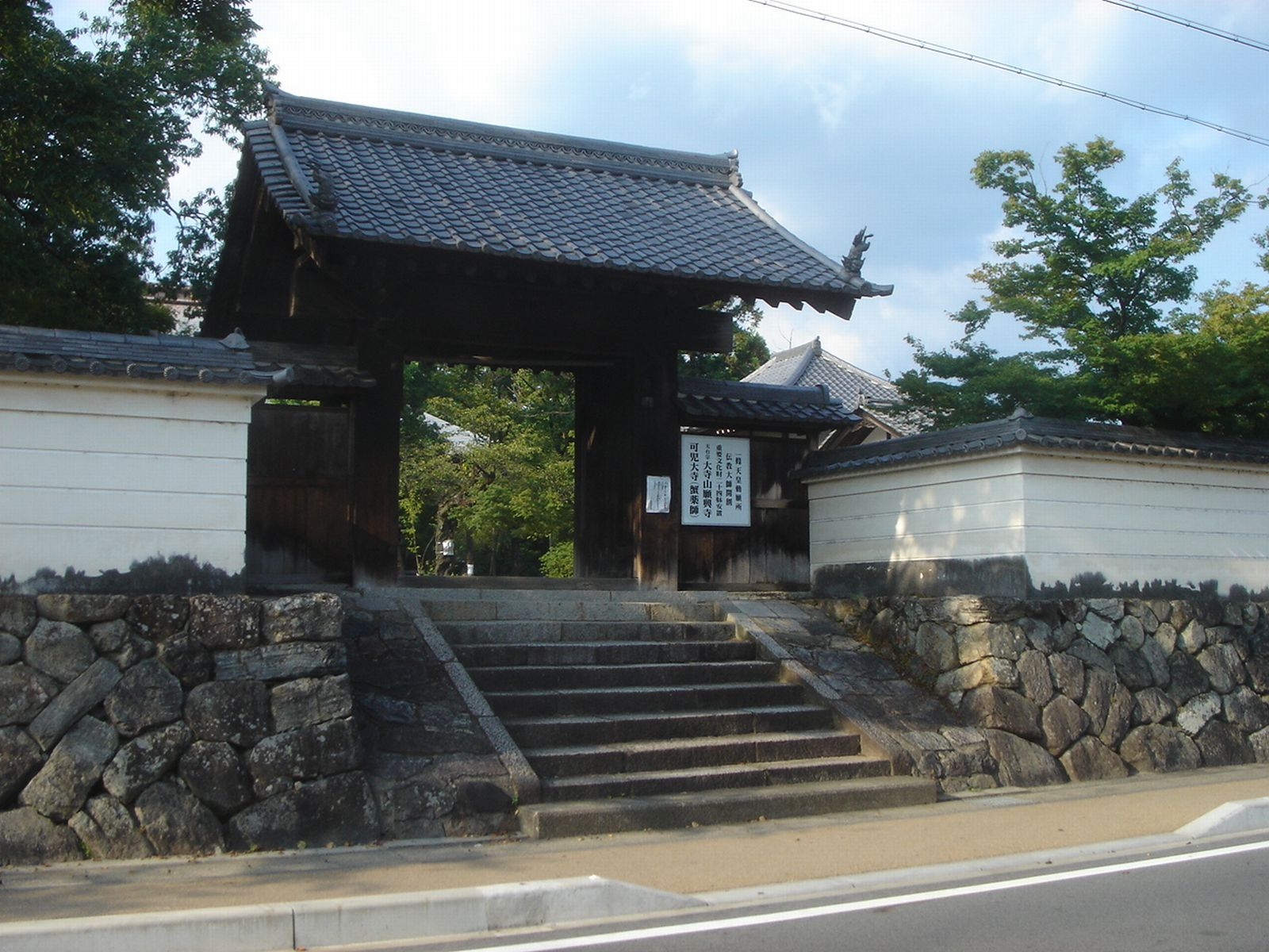 Ganko-ji(Temple)(願興寺),Mitake,Gifu,Japan(岐阜県御嵩町)で撮影。